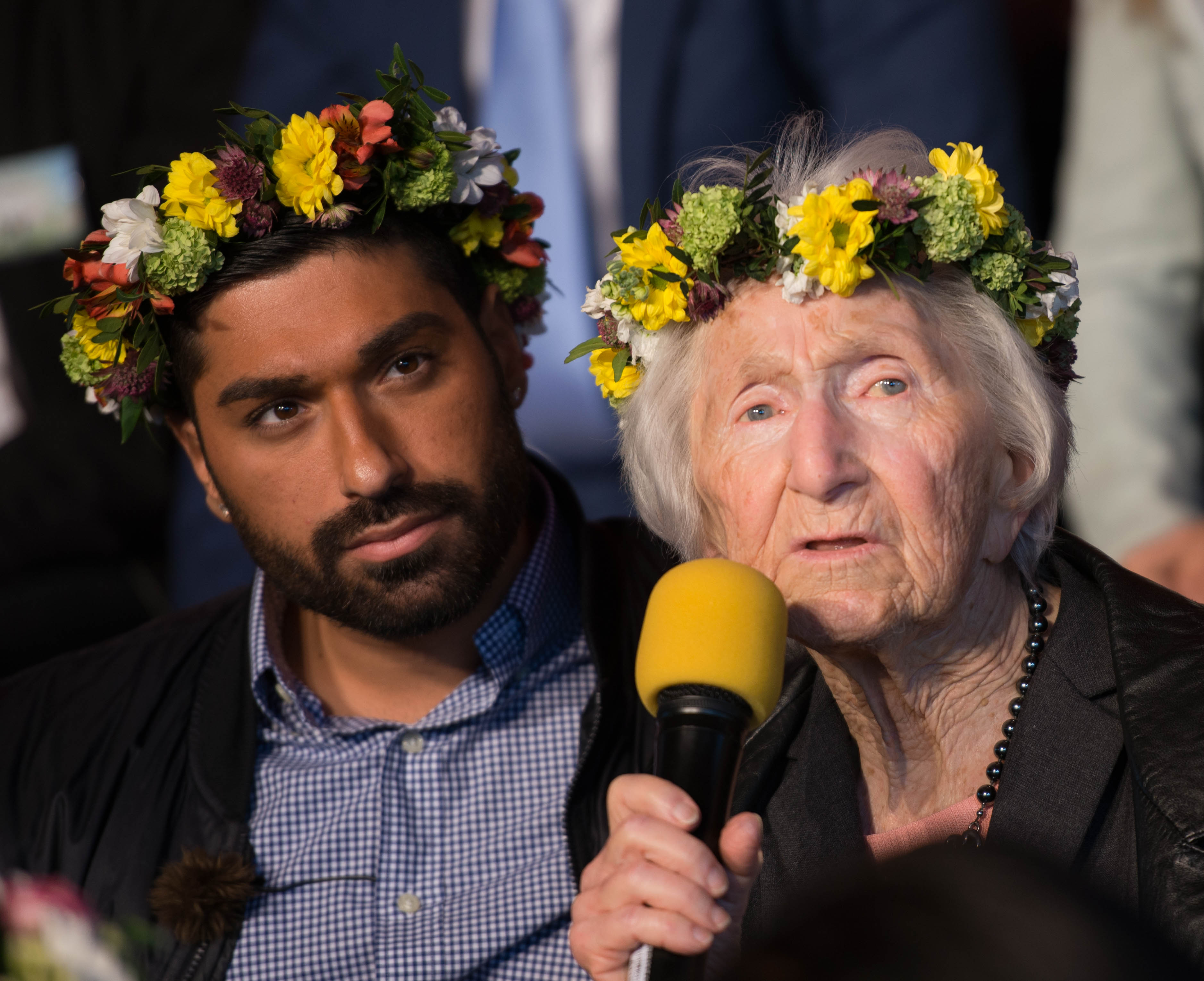 Siavosh Derakhti och Hédi Fried som en av Sommarpratarna i P1 på presskonferensen i Radiohusets trädgård den 3 juni 2015.